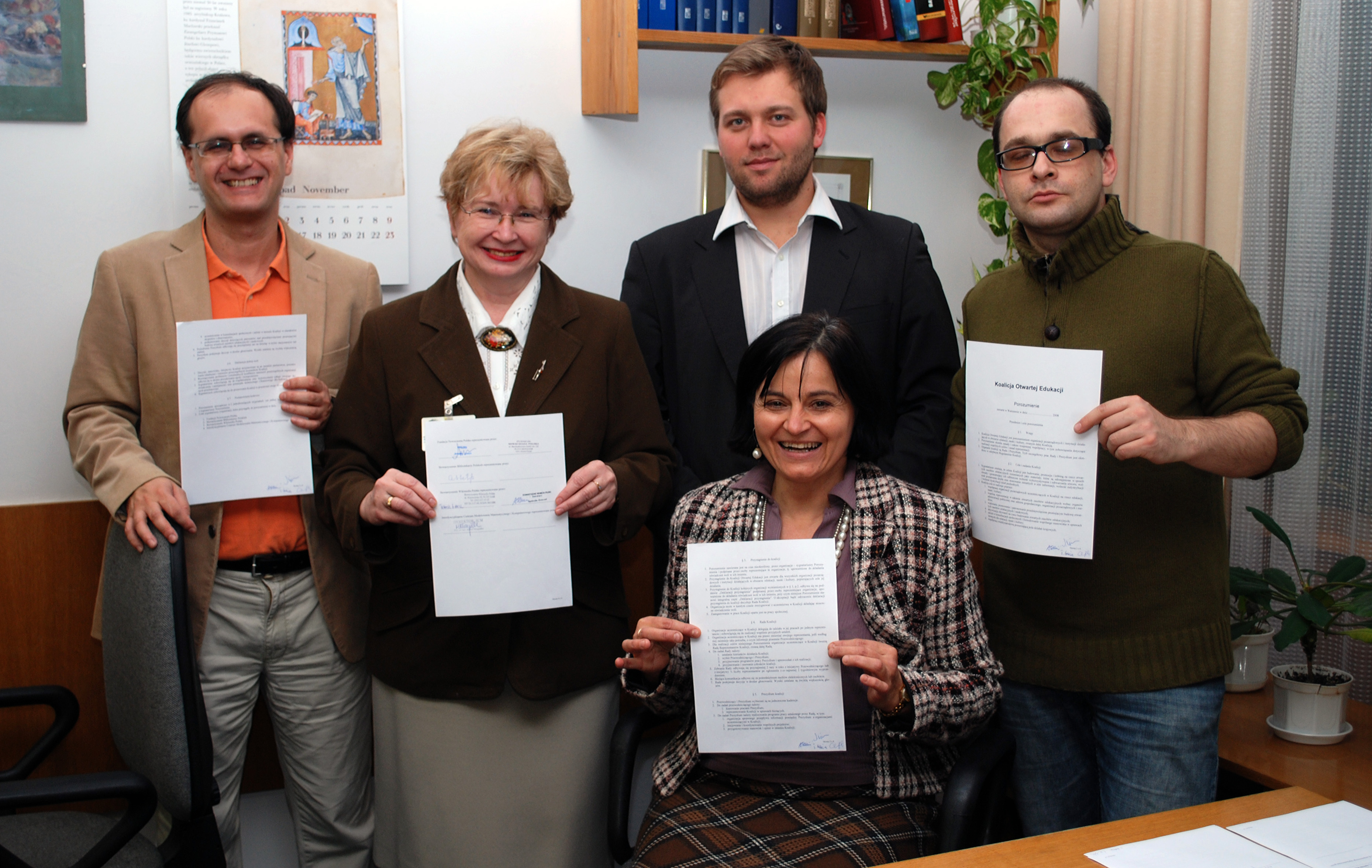 Moment podpisywania umowy zawiązania Koalicji Otwartej Edukacji [1]. Od lewej: Polimerek, Elżbieta Stefańczyk, Bożena Bednarek-Michalska (siedzi), Alek Tarkowski (stoi), Jarosław Lipszyc